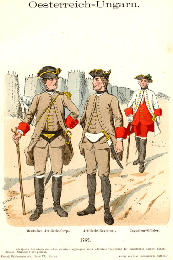 Иллюстрация Рихарда Кнотеля